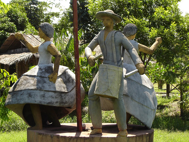 Museu Sacacá, em Macapá, Amapá, Brasil. Foto de Marcus Paulo tirada em 30 de dezembro de 2005.